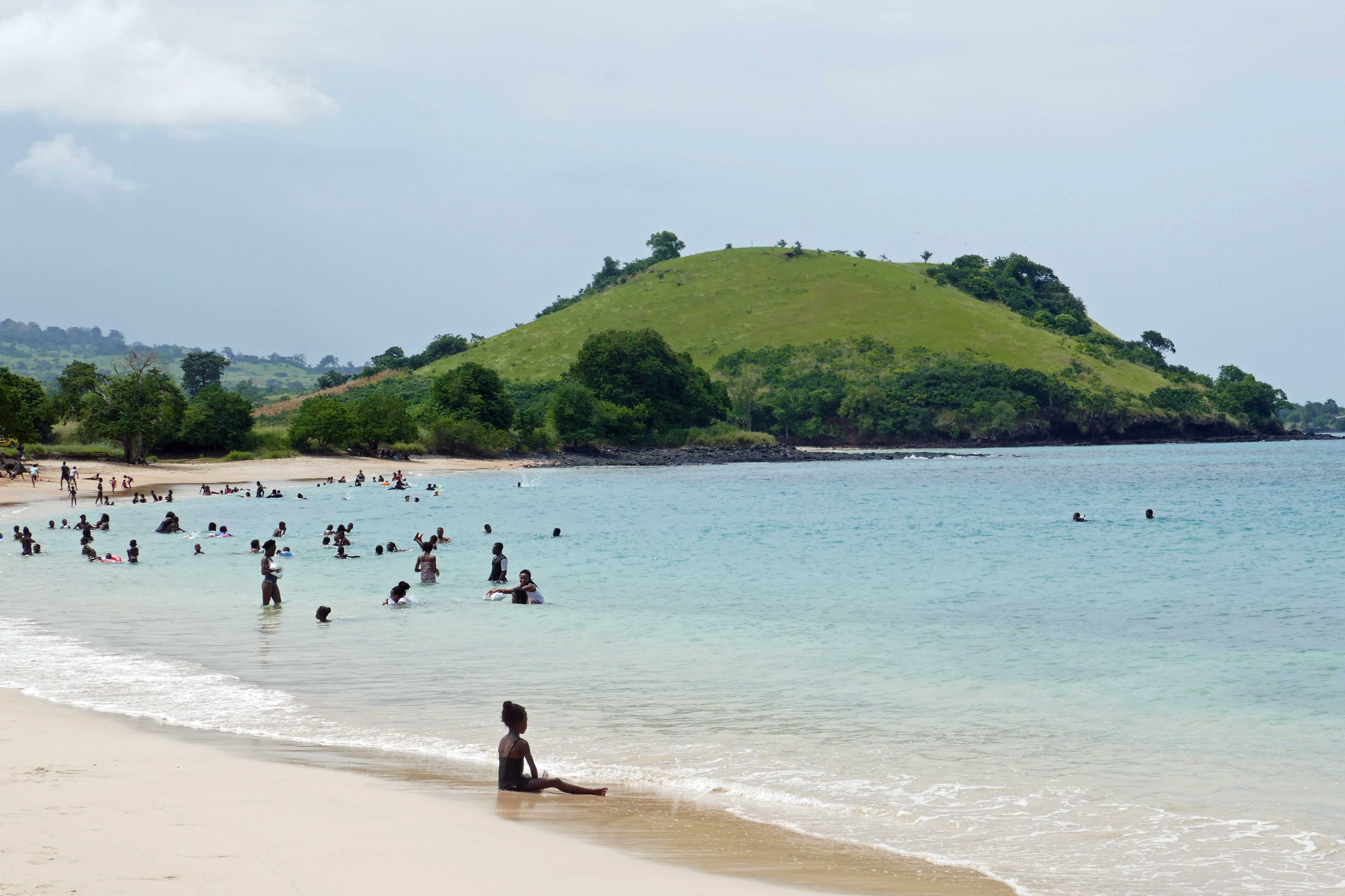 Dimanche en famille sur la plage des Tamarins au nord de l'île de São Tomé (São Tomé-et-Principe). This is an image with the theme "Play" from: Sao Tome and Principe